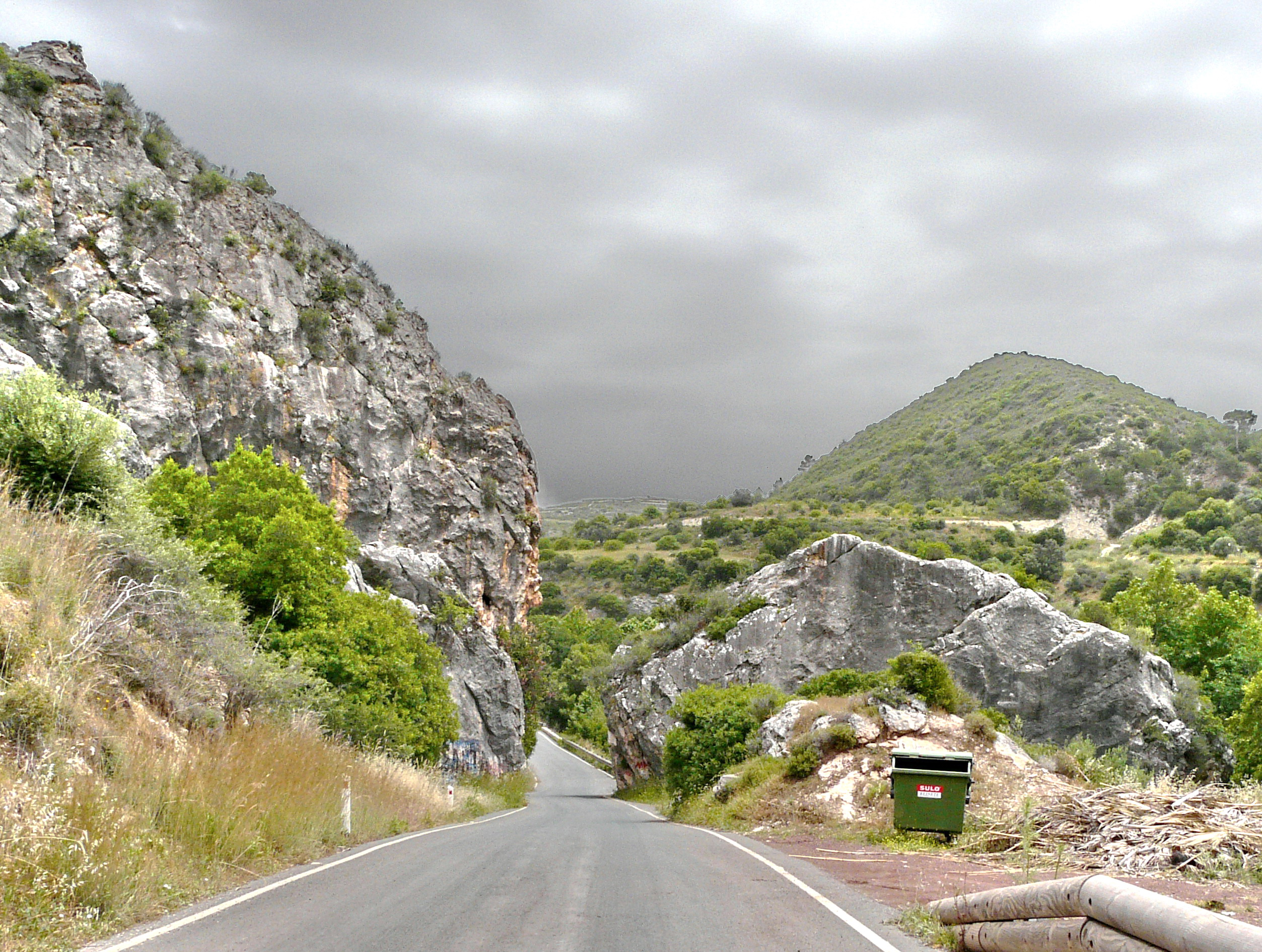 Souskiou, Cyprus